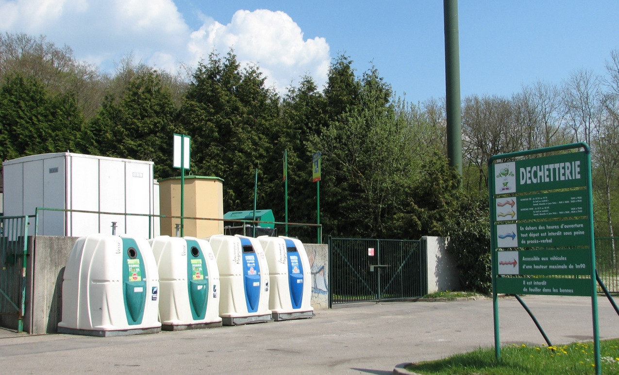 Déchetterie, recyclage de déchets